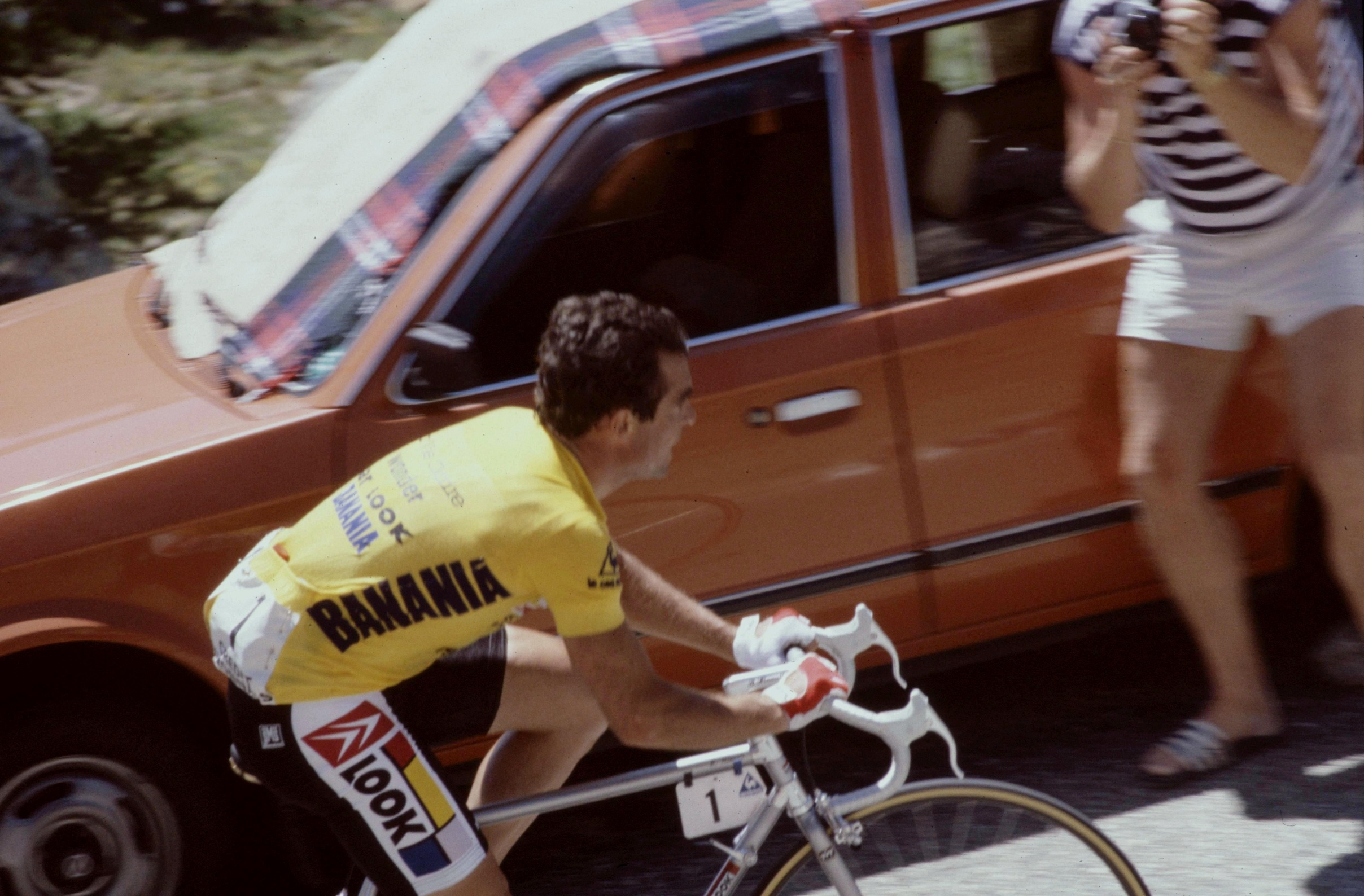 Hautes-Alpes Col De L'Izoard Tour De France Hinault 071986